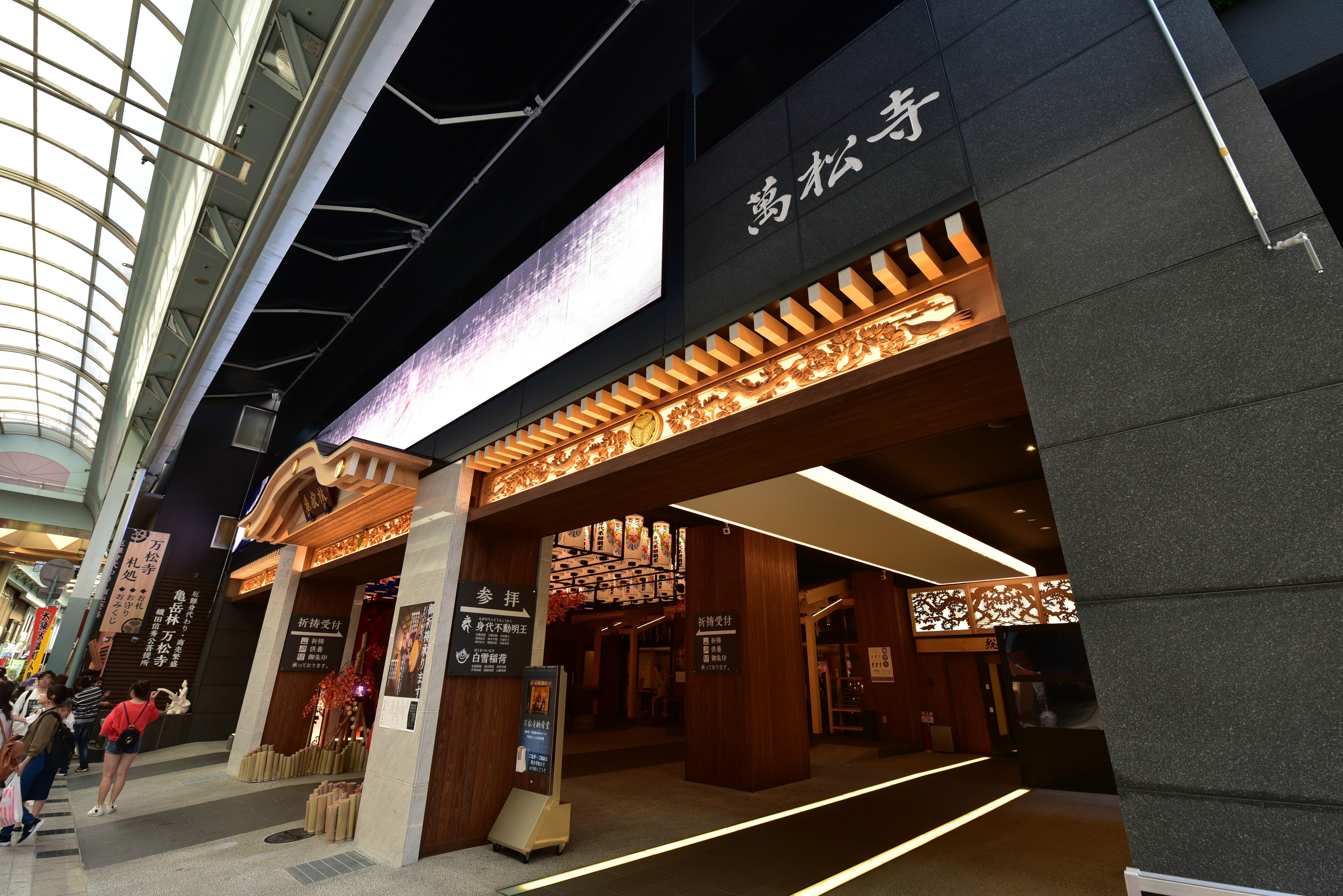 萬松寺境内